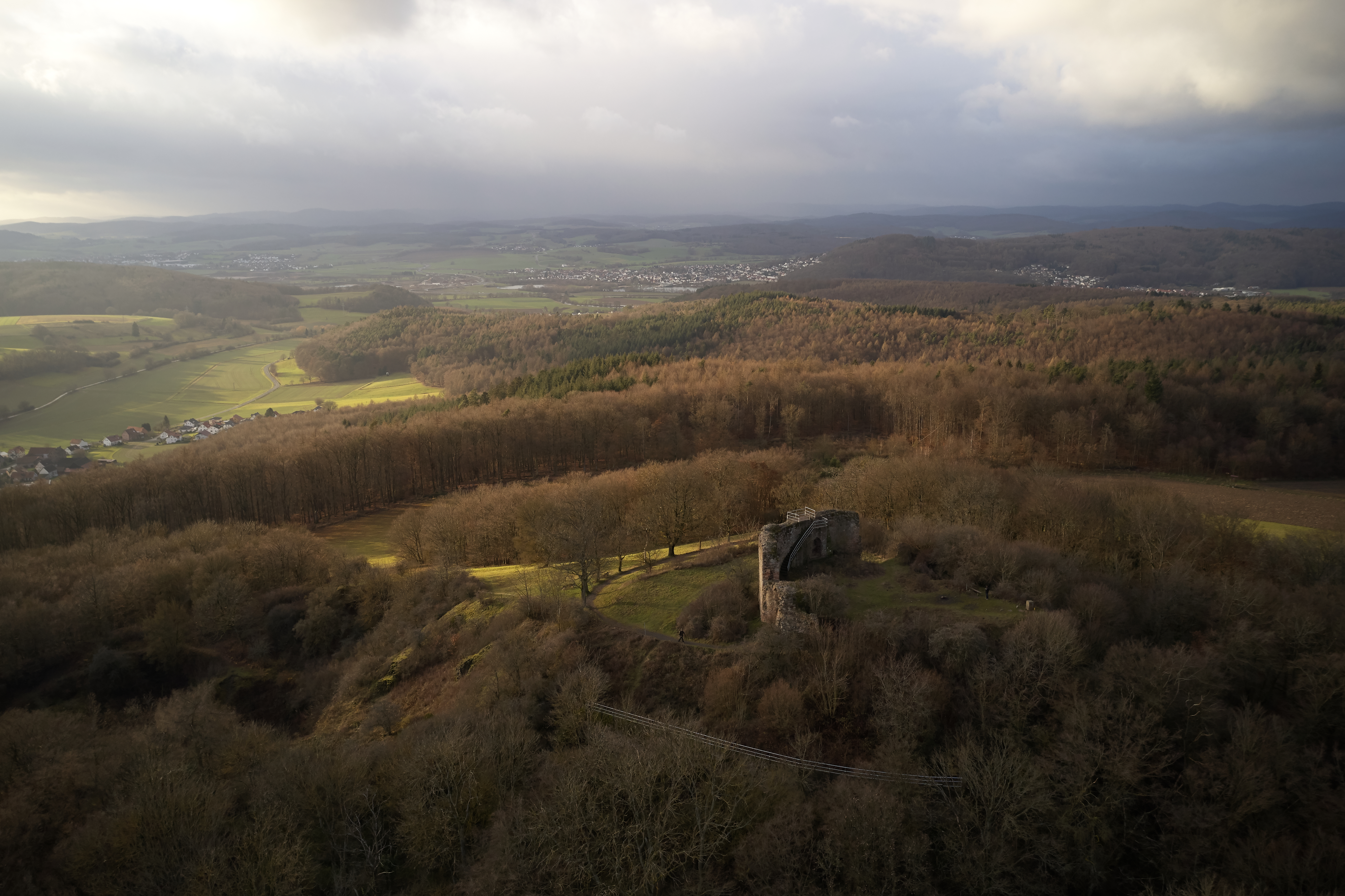 Luftbild der Ruine der Burg Frauenberg in Hessen mit Blick südwestlich auf das Lahntal